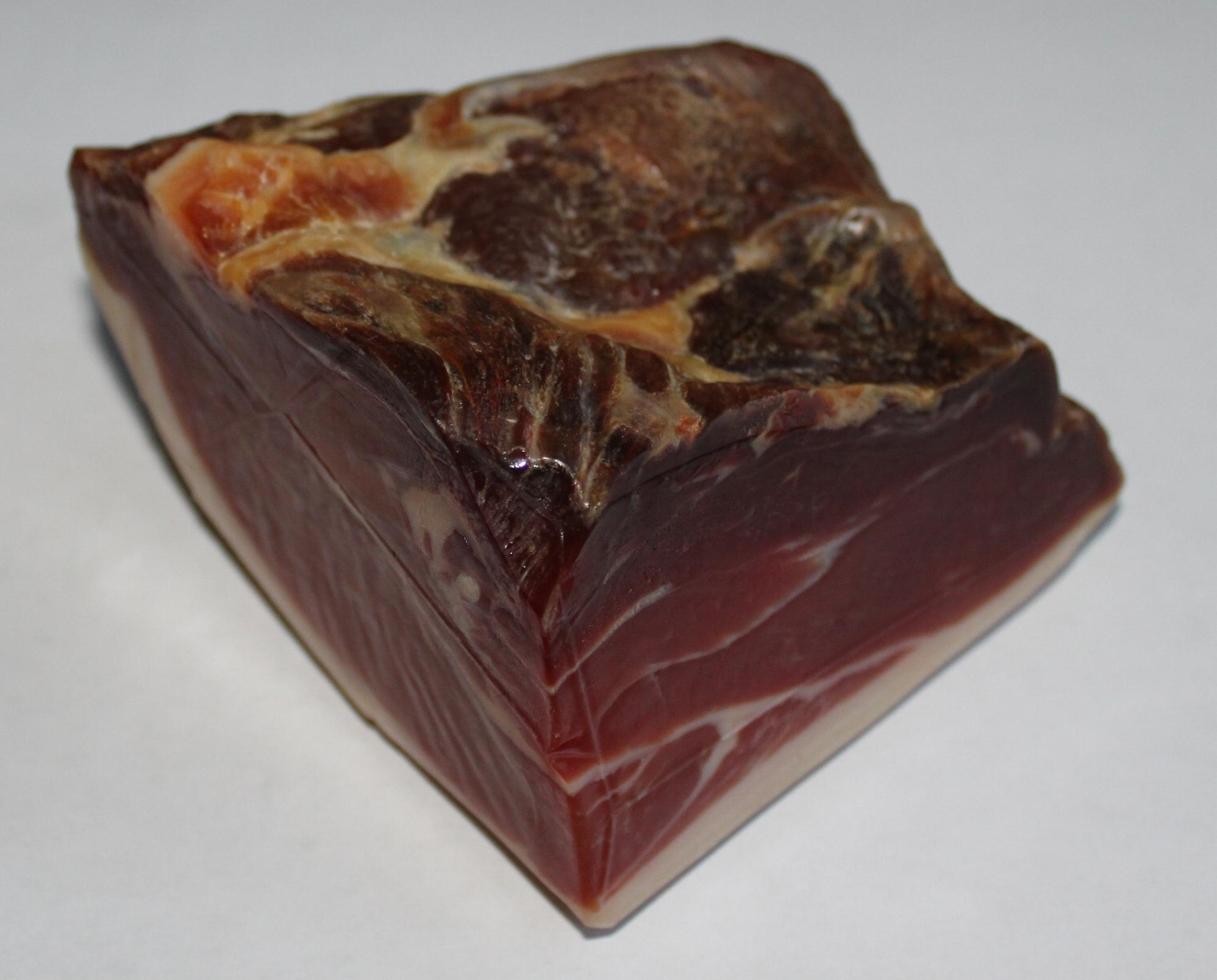 Portion Knochenschinken 1 Pfund, 12 Monate gereift, im Anschnitt wie im Versandhandel angeboten. Hersteller Schinkenland.eu